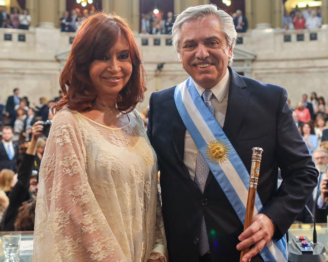 Ceremonia de asunción del presidente Alberto Fernández. 10 de diciembre de 2019. Honorable Congreso de la Nación.